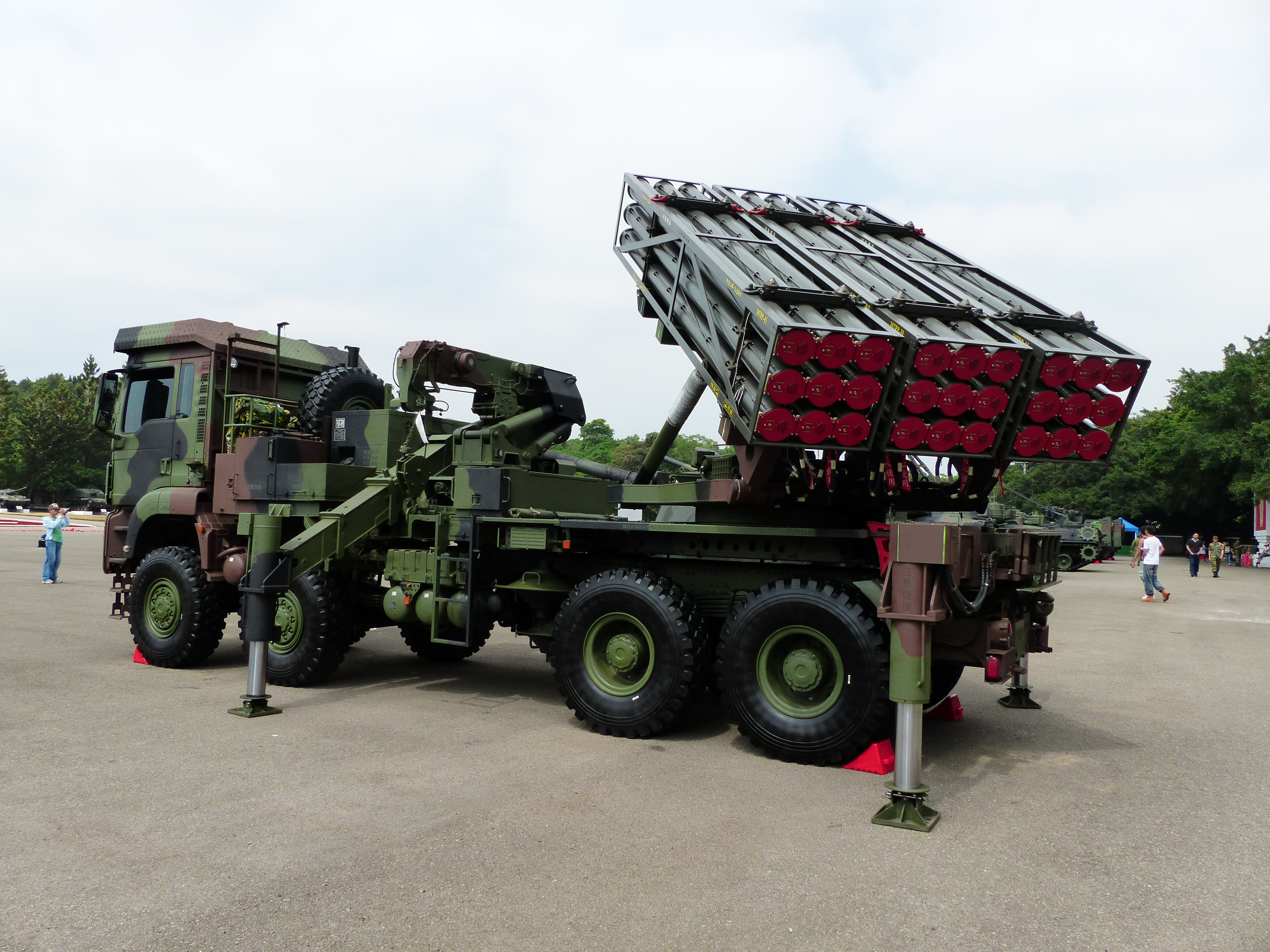 2013年成功嶺營區開放活動，陸軍雷霆2000多管火箭系統（MK-30火箭模組搭載型）左後方。